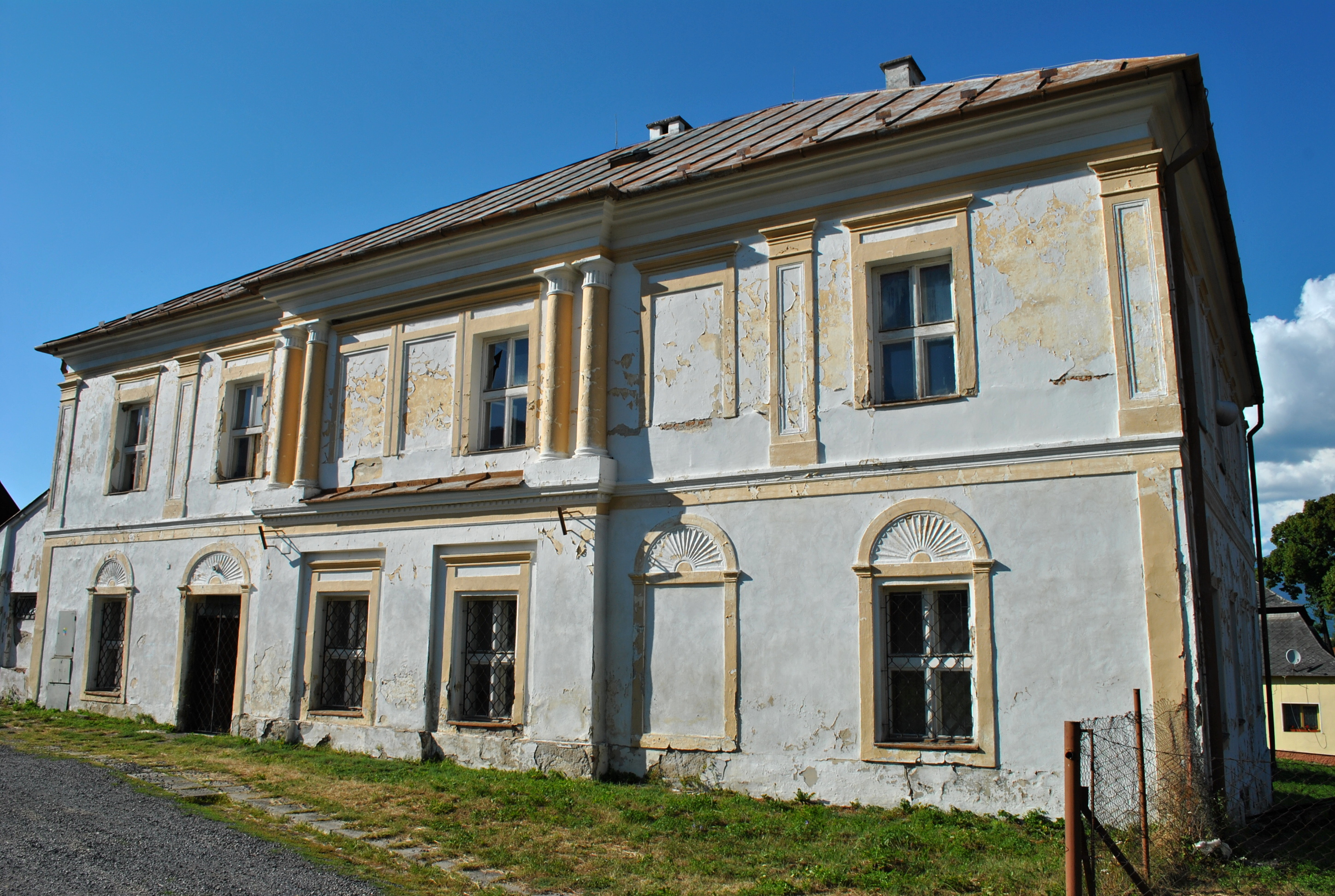 Kaštieľ